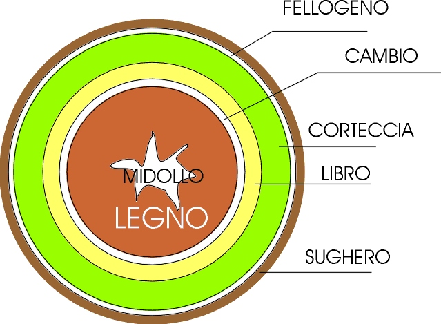 Immagine di Danilo Giacomelli